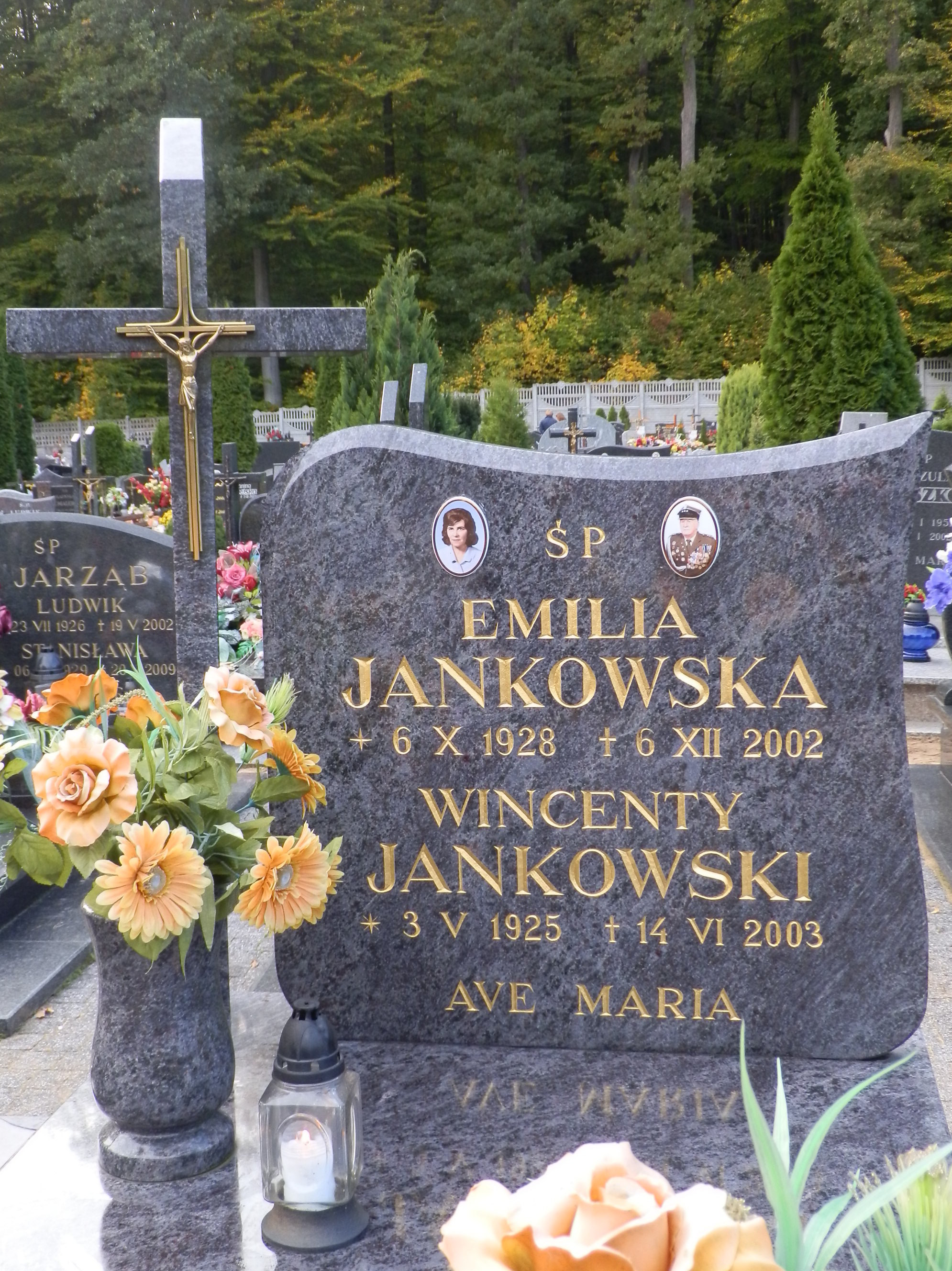 Grób rodziny Jankowskich na cmentarzu w Łobzie